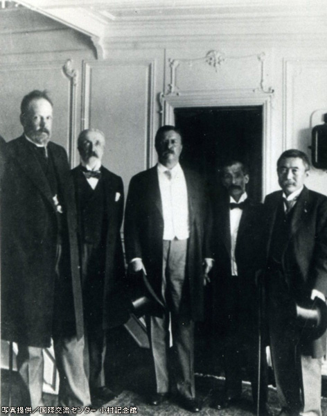 左より、ロシア全権のセルゲイ・ウィッテ、ロマン・ローゼン、アメリカ合衆国セオドア・ルーズベルト大統領、日本の全権の小村寿太郎、高平小五郎